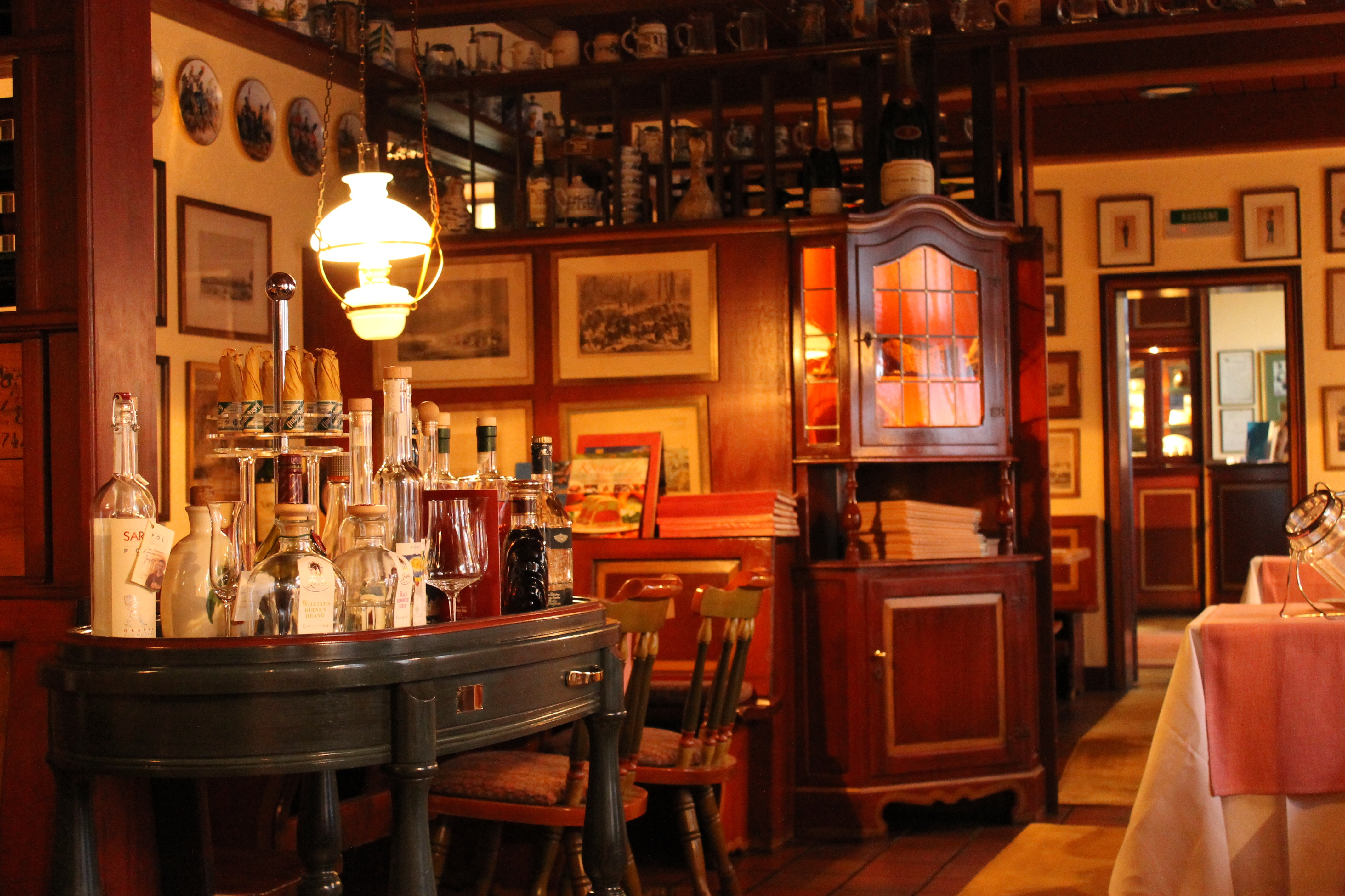 Innenansicht vom historischem Restaurantbereich